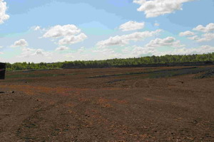 Blick auf abgetorfte Flächen im Naturschutzgebiet Göldenitzer Moor, Mecklenburg-Vorpommern.